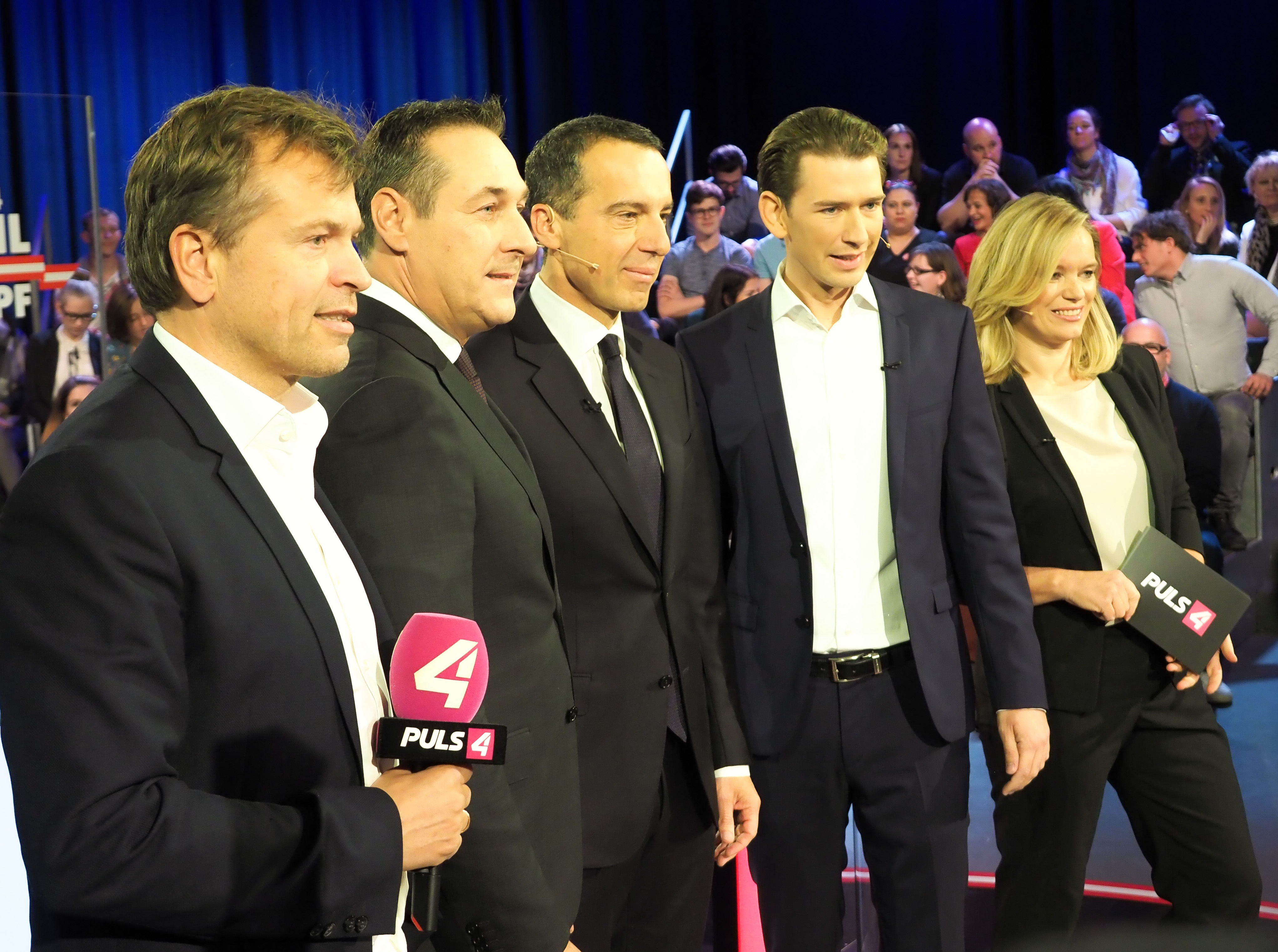 Bundeskanzler Kern im Puls-4-TV-Duell mit ÖVP-Obmann Kurz am 7.10.17. (Fotos: SPÖ/Zach-Kiesling).